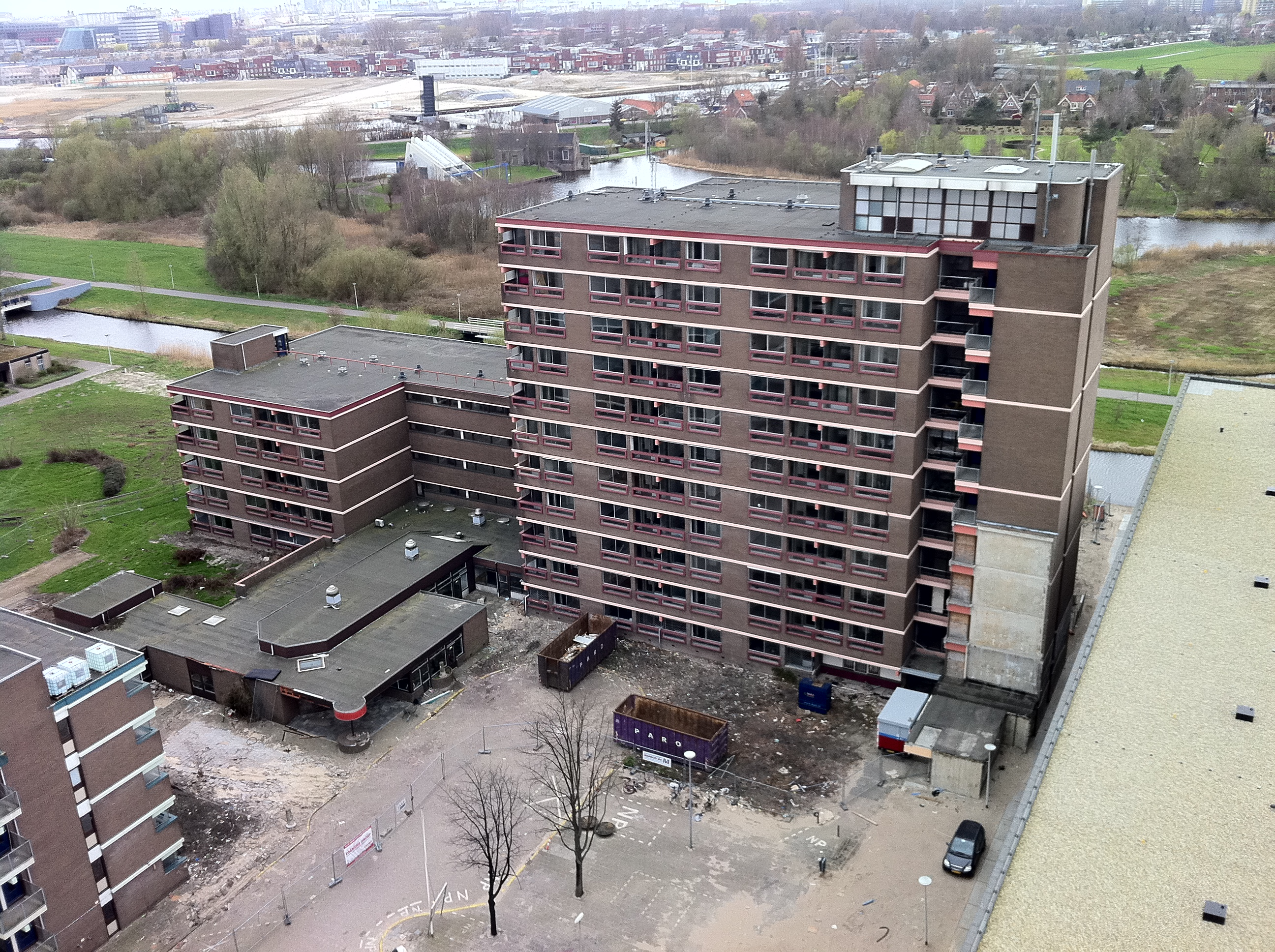 Amsterdam - oude seniorencentrum Evean Kadoelerbreek